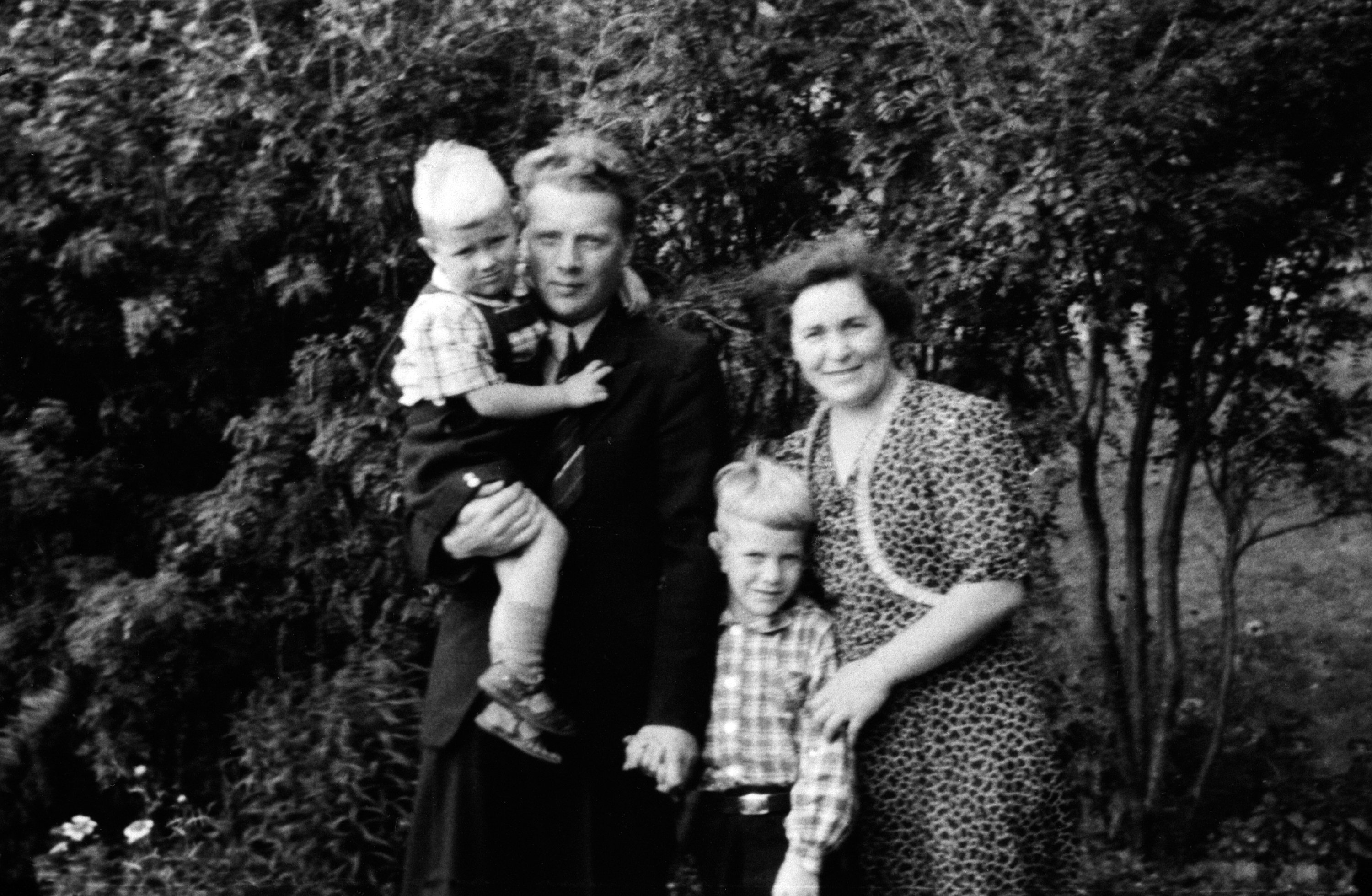 Adolf Skjegstad med kona Petra og sønnene Annar (på armen) og Odd Kjell, dagen etter at Adolf slapp ut fra Grini 16. august 1942